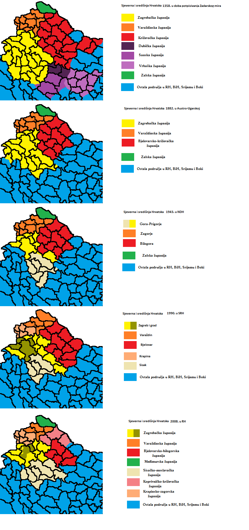 Županije sjeverne i središnje Hrvatske